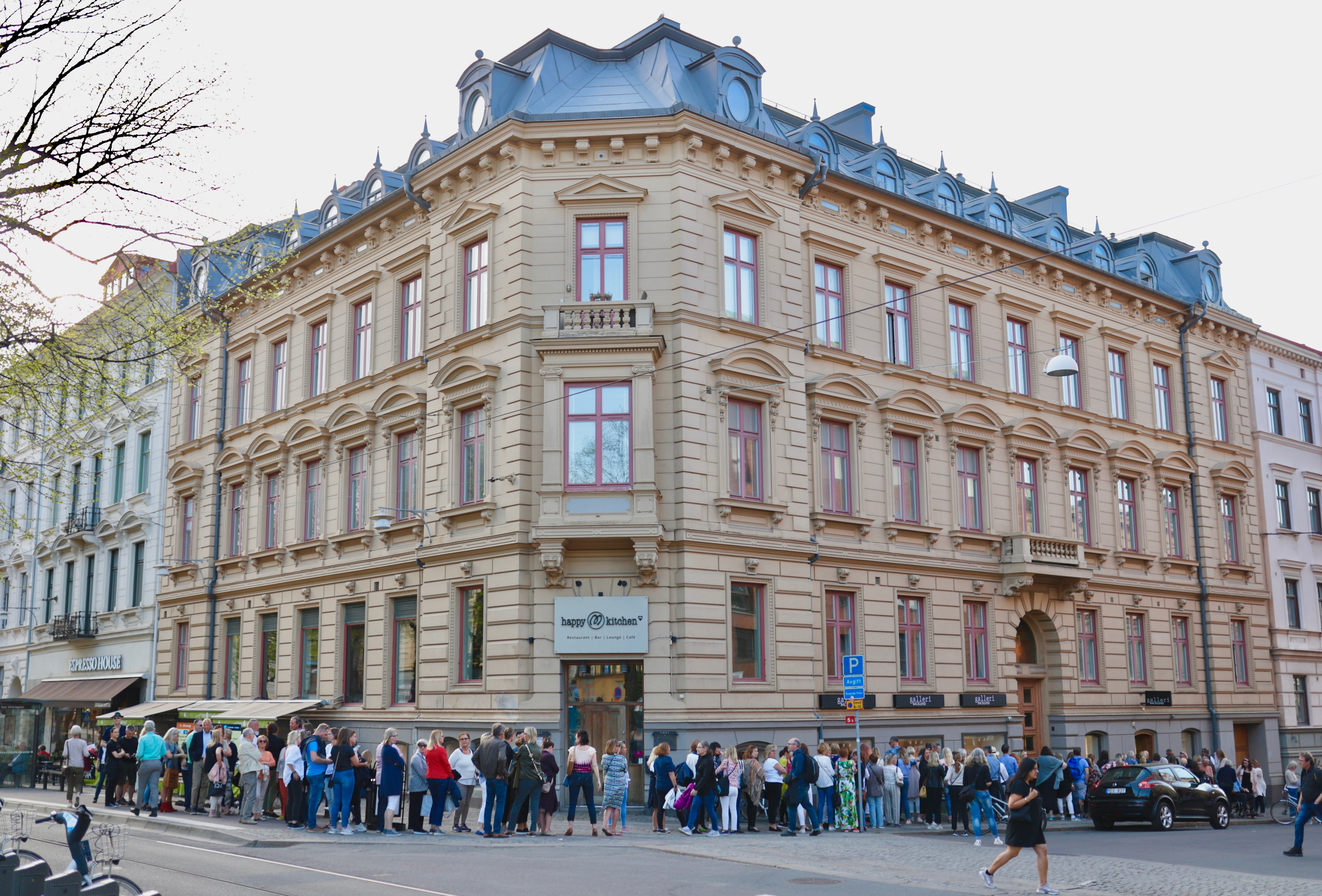 Kö utanför Galleri Backlund på Karl Gustavsgatan 13 i Vasastan, Göteborg. Foto: Ida Gudmundsson